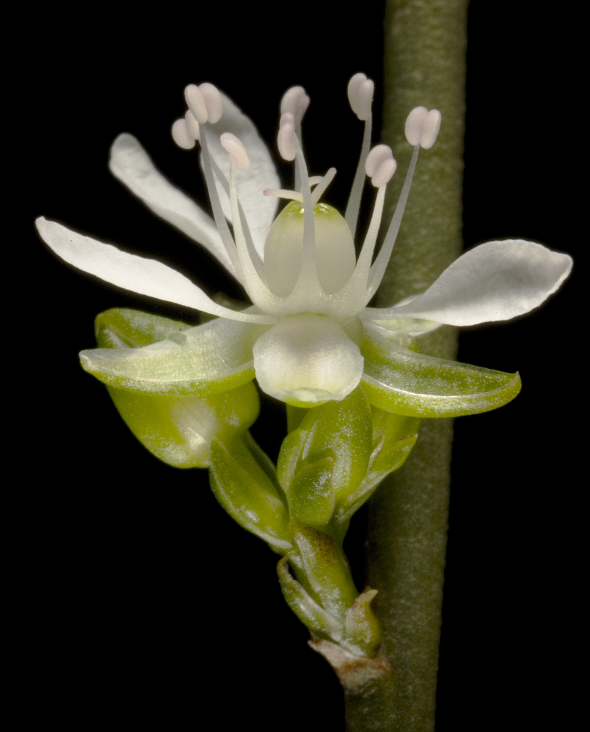 Macarthuria australis